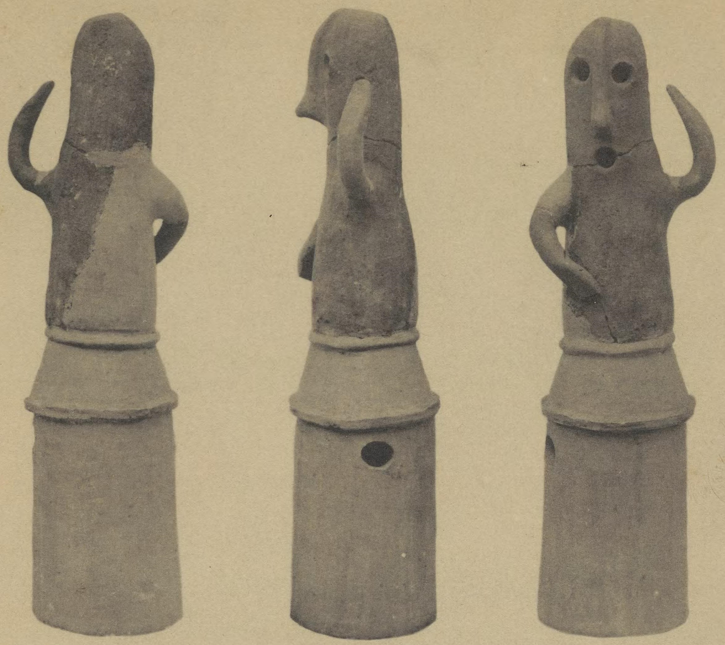 埴輪 踊る人々（大）の三面（正面・左・背面）。